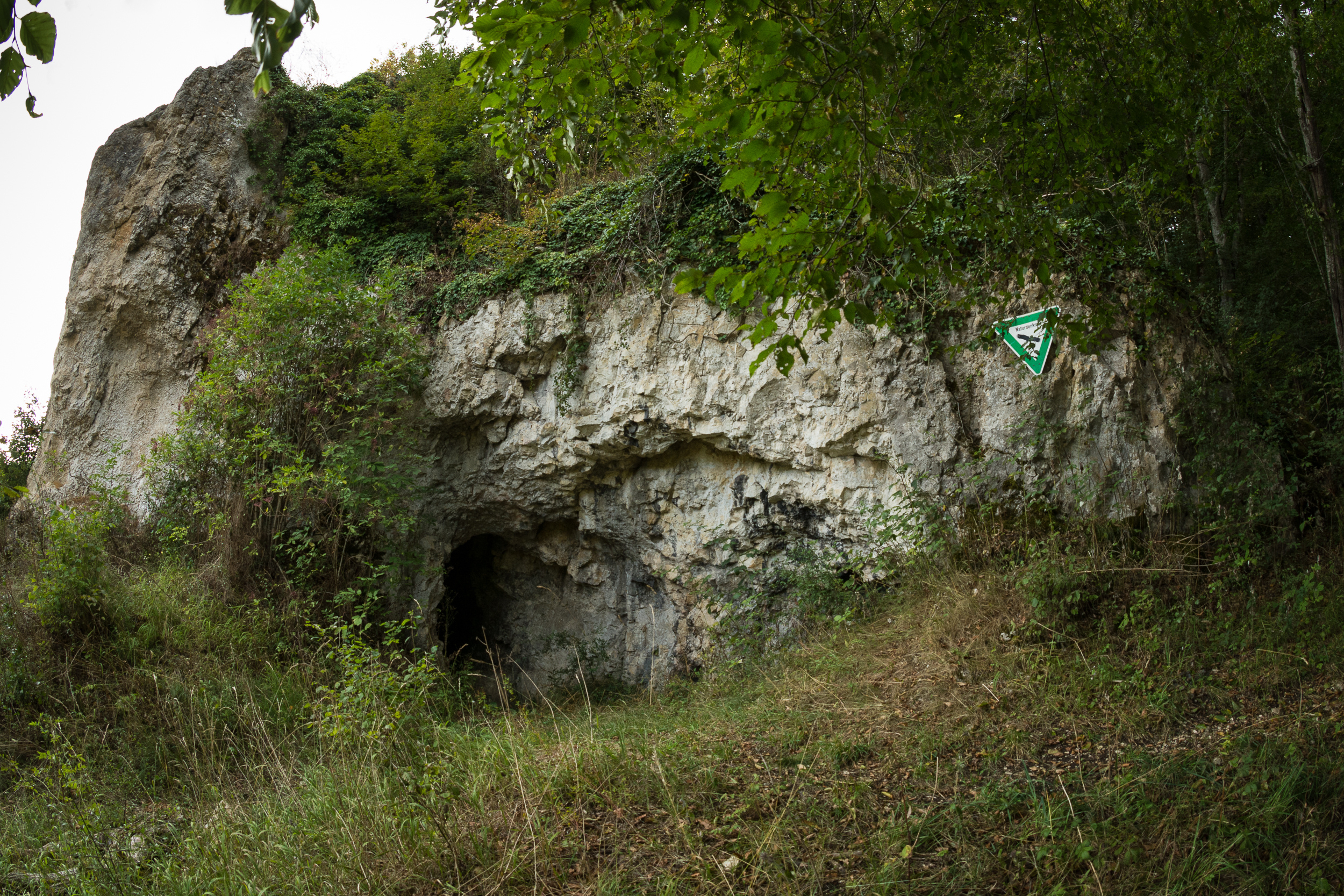 Die Ramensteinhöhle bei Nattheim im Landkreis Heidenheim, Baden-Württemberg.